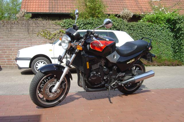 Triumph Trident 900, Baujahr 1996 (Motorrad) Andere Versionen: keine Triumph Trident 900 Bj. 1996. Technische Daten: wassergekühlter Viertakt-Dreizylinder-Reihenmotor, vier Ventile pro Zylinder, zwei obenliegende Nockenwellen, elektronische Zündanlage, drei Mikuni-Gleichdruckvergaser. Hubraum 885 Kubikzentimeter, Leistung 72 kW/98 PS bzw. 83 Nm. Kraftstoffsorte Super unverbleit. Keine Abgasreinigung. Gewicht vollgetankt 252 kg. Primärantrieb über Zahnräder, hydraulisch betätigte Mehrscheibenkupplung im Ölbad, Sechsgang-Getriebe, Endantrieb über Kette. Telegabel vorne, über Hebelsystem angelenktes Zentralfederbein hinten. Reifendimensionen 120/70 VR 17 vorne und 160/60 VR 18 hinten. Zweischeiben-Bremsanlage vorne mit schwimmend gelagerten Bremsscheiben und Vierkolben-Bremssätteln (abweichend zur Serie), Einscheibenbremse hinten. Bremsen vorne und hinten hydraulisch betätigt. Kupplungs- und vordere Bremsleitungen aus Stahlflex (abweichend zur Serie). Cockpit mit Tachometer, Drehzahlmesser und Kühlwassertemperaturanzeige. Handbrems- und Kupplungshebel vierfach einstellbar.